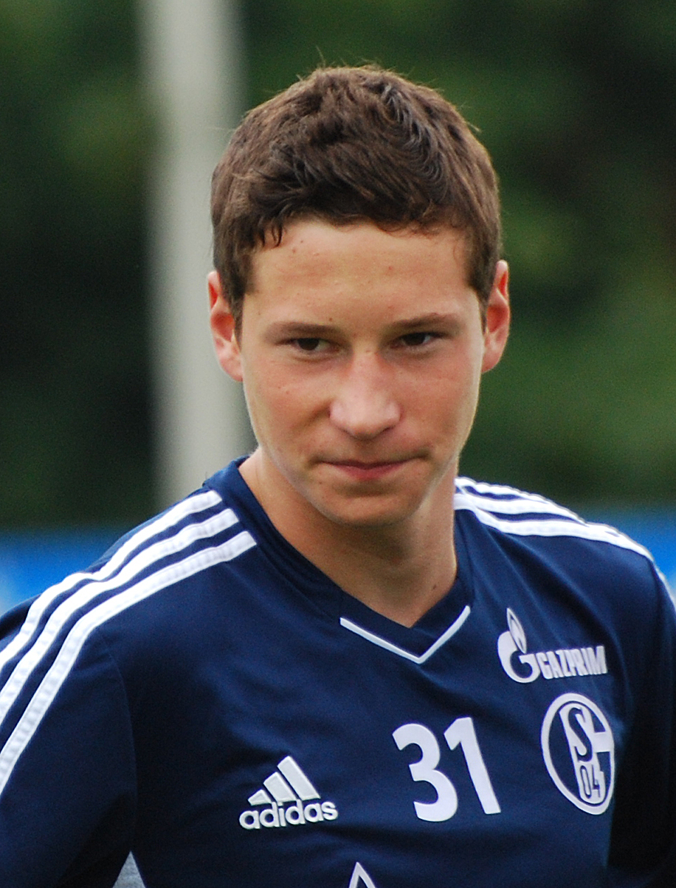 Julian Draxler